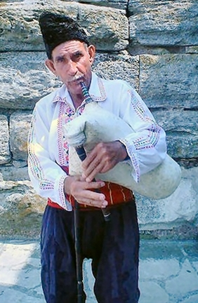 Bulgaarse gaidaspeler. Nessebar, 2005.